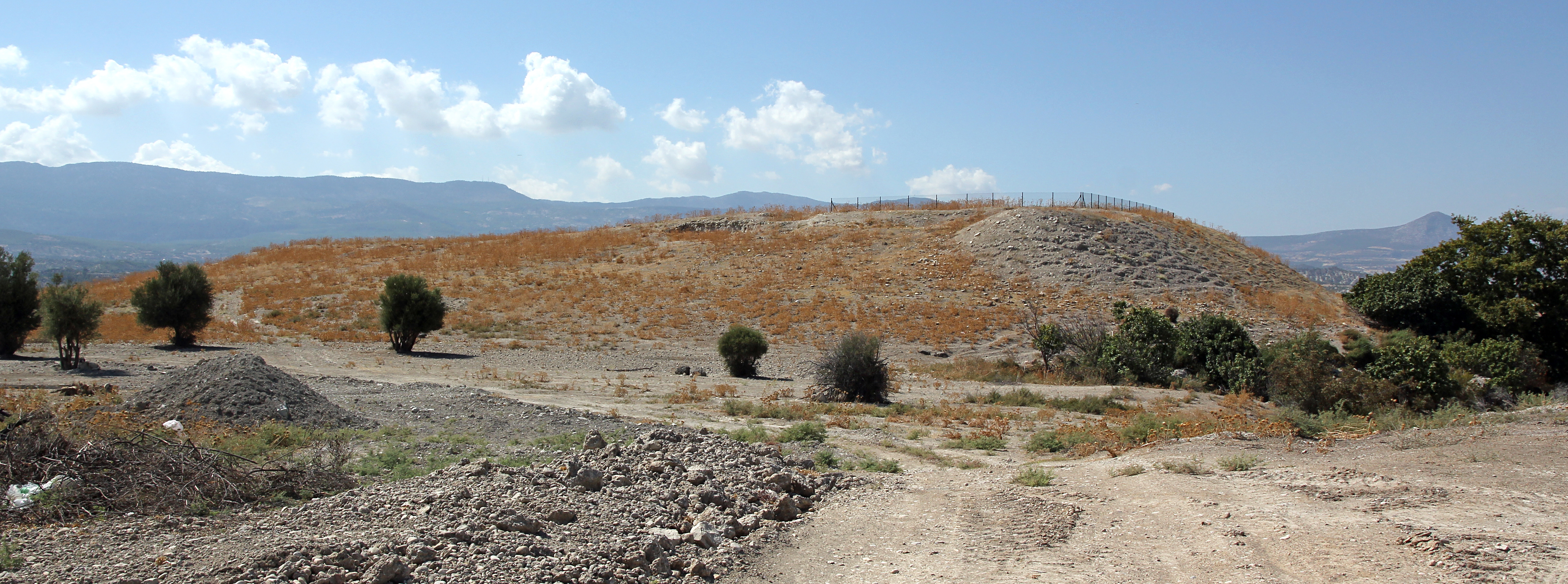 Kilise Tepe, hethitischer Siedlungshügel nahe Mut, Südtürkei, Ansicht von Nordosten